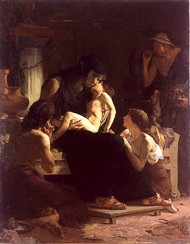 Pierre Bodard, Cérès rendant la vie à un enfant, 1909, Paris, ENSBA